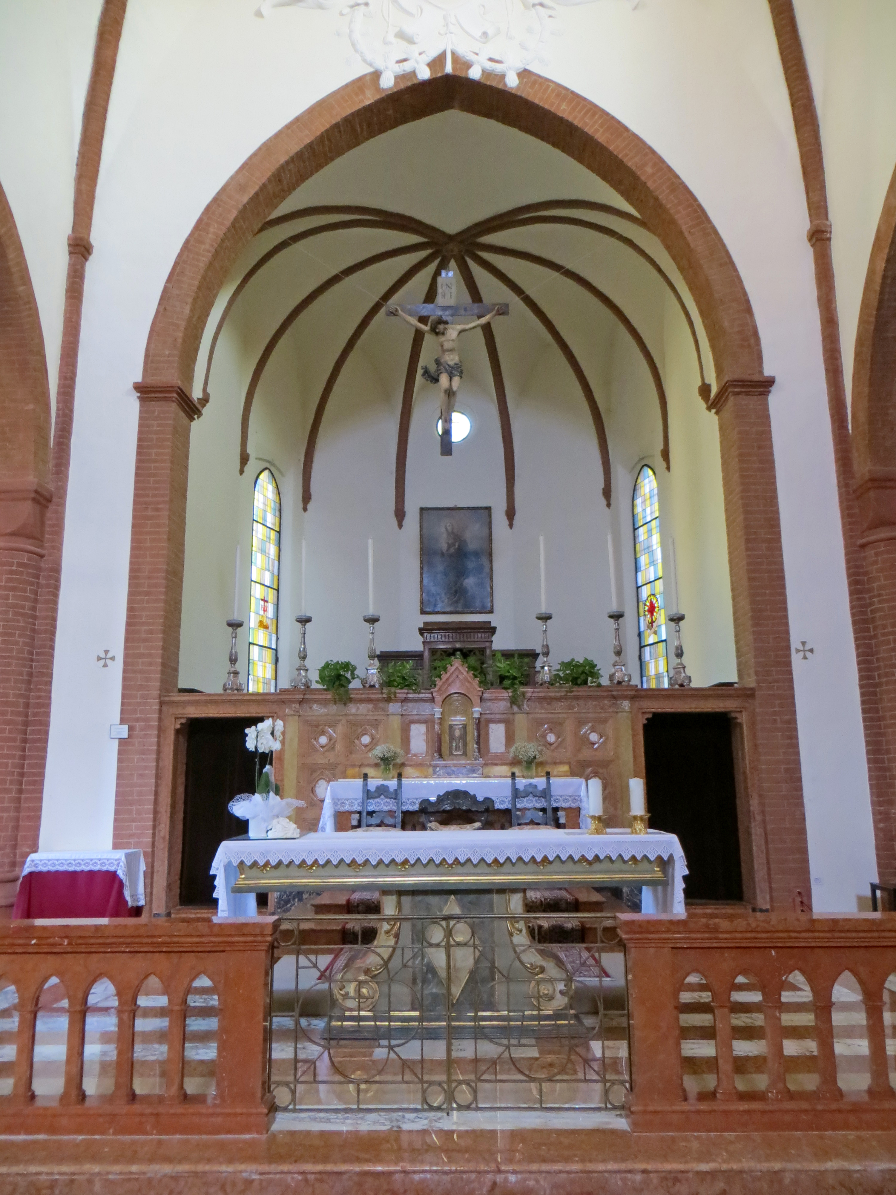 Chiesa di Santa Maria degli Angeli (Busseto) - presbiterio